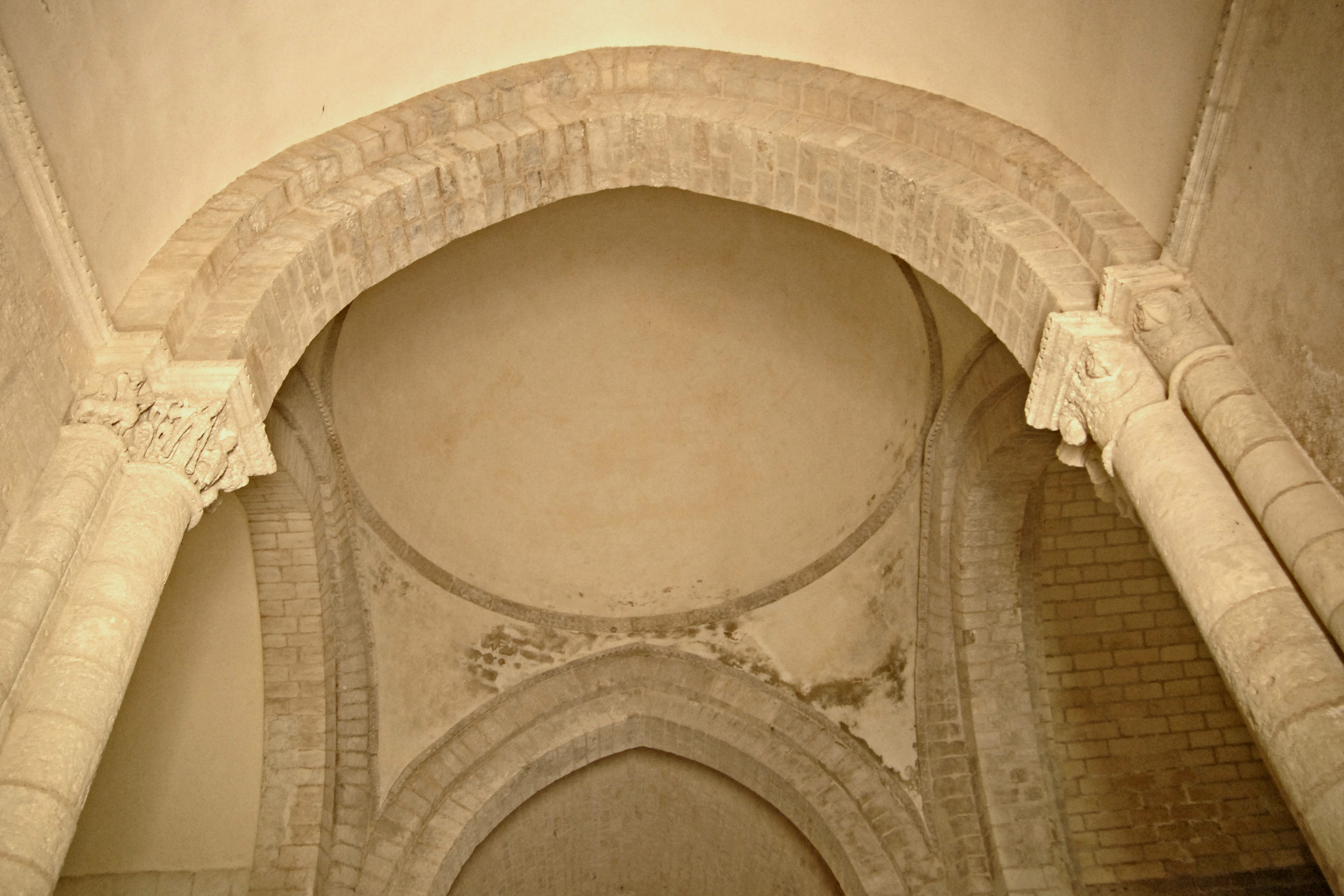 Vierung, Pendentifkuppel